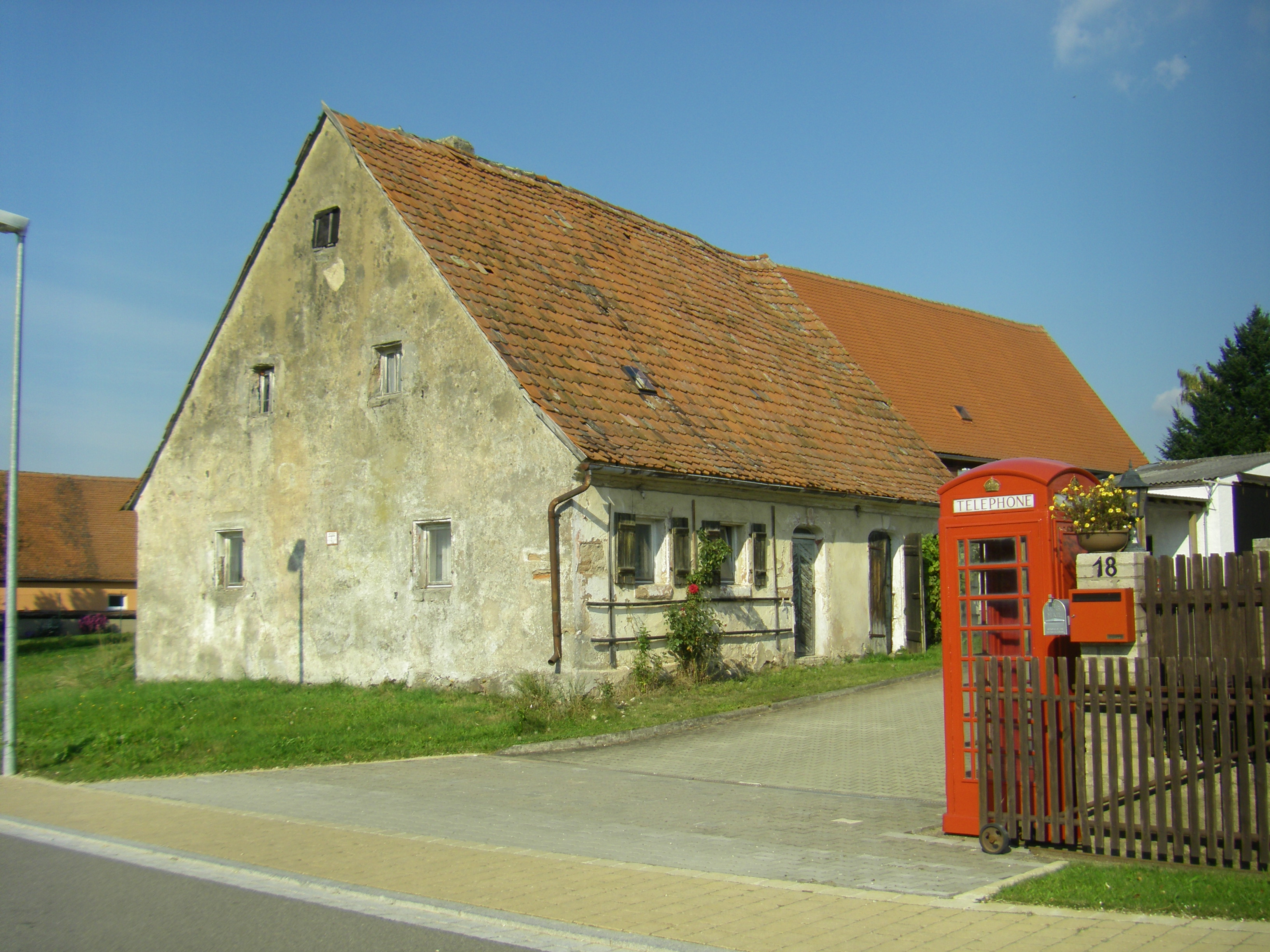 Altes Wohnstallhaus, Suddersdorf 18, Windsbach